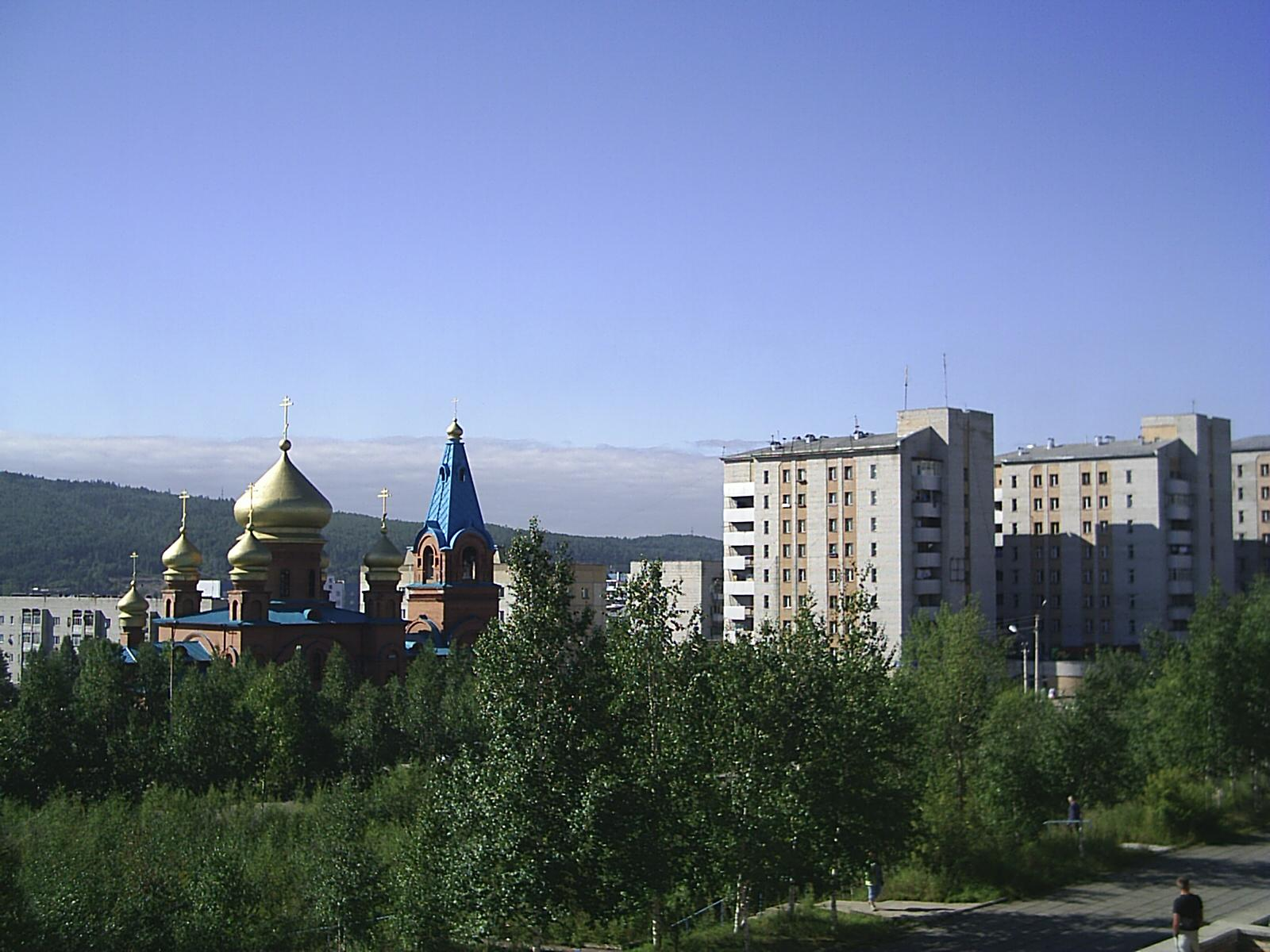 снимки августа 2006 г.